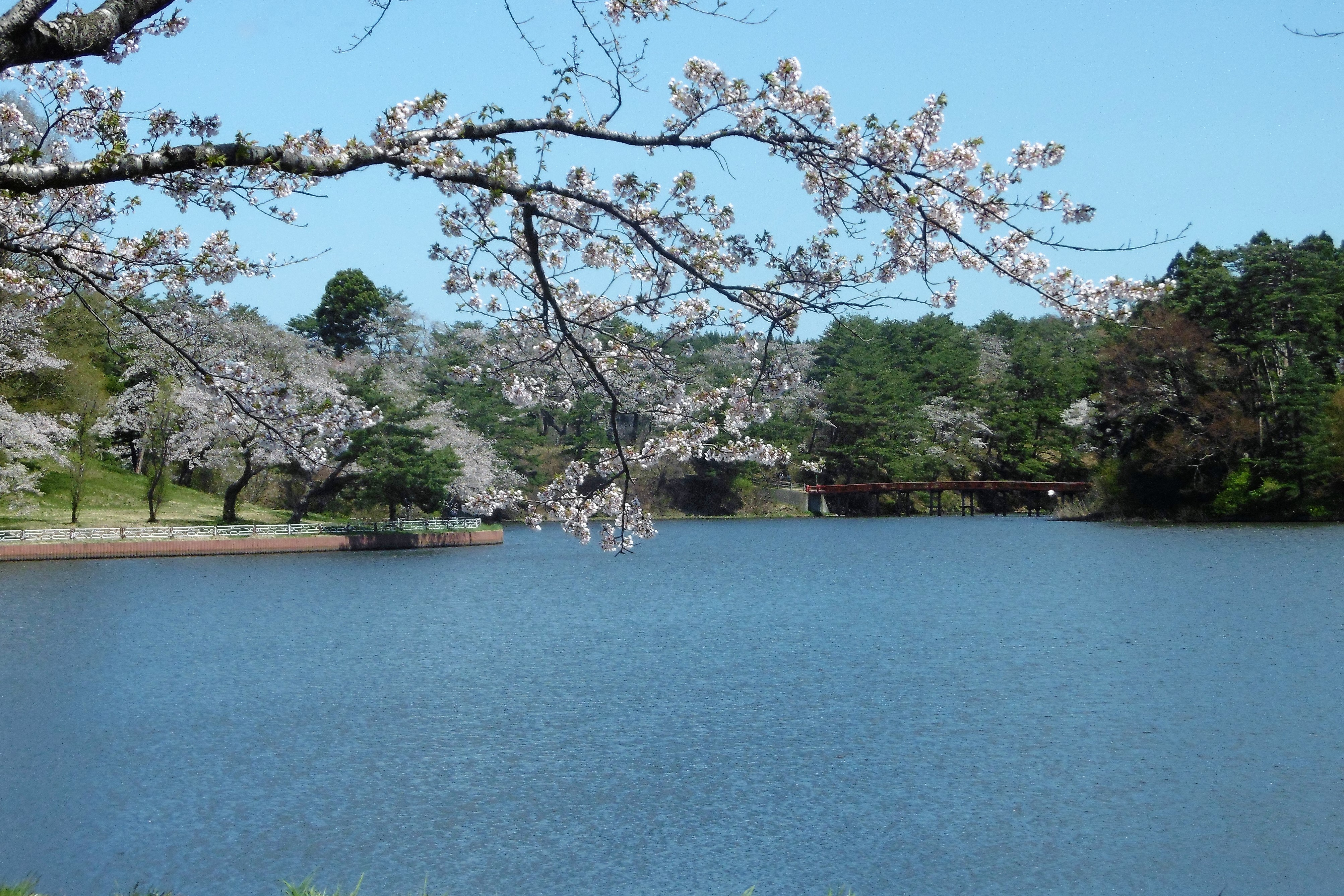 新観光秋田30景 鷹巣中央公園（秋田県北秋田市）